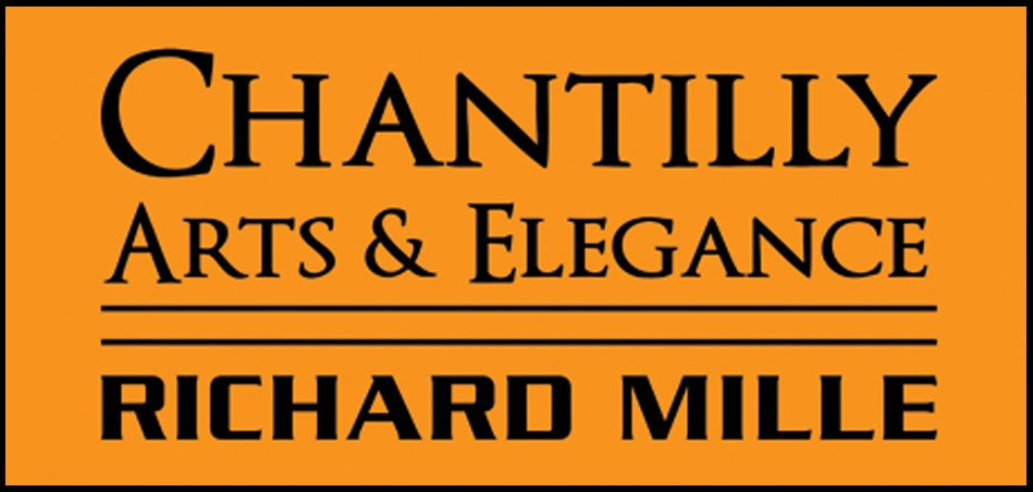 Logo du Chantilly Arts & Élégance Richard Mille